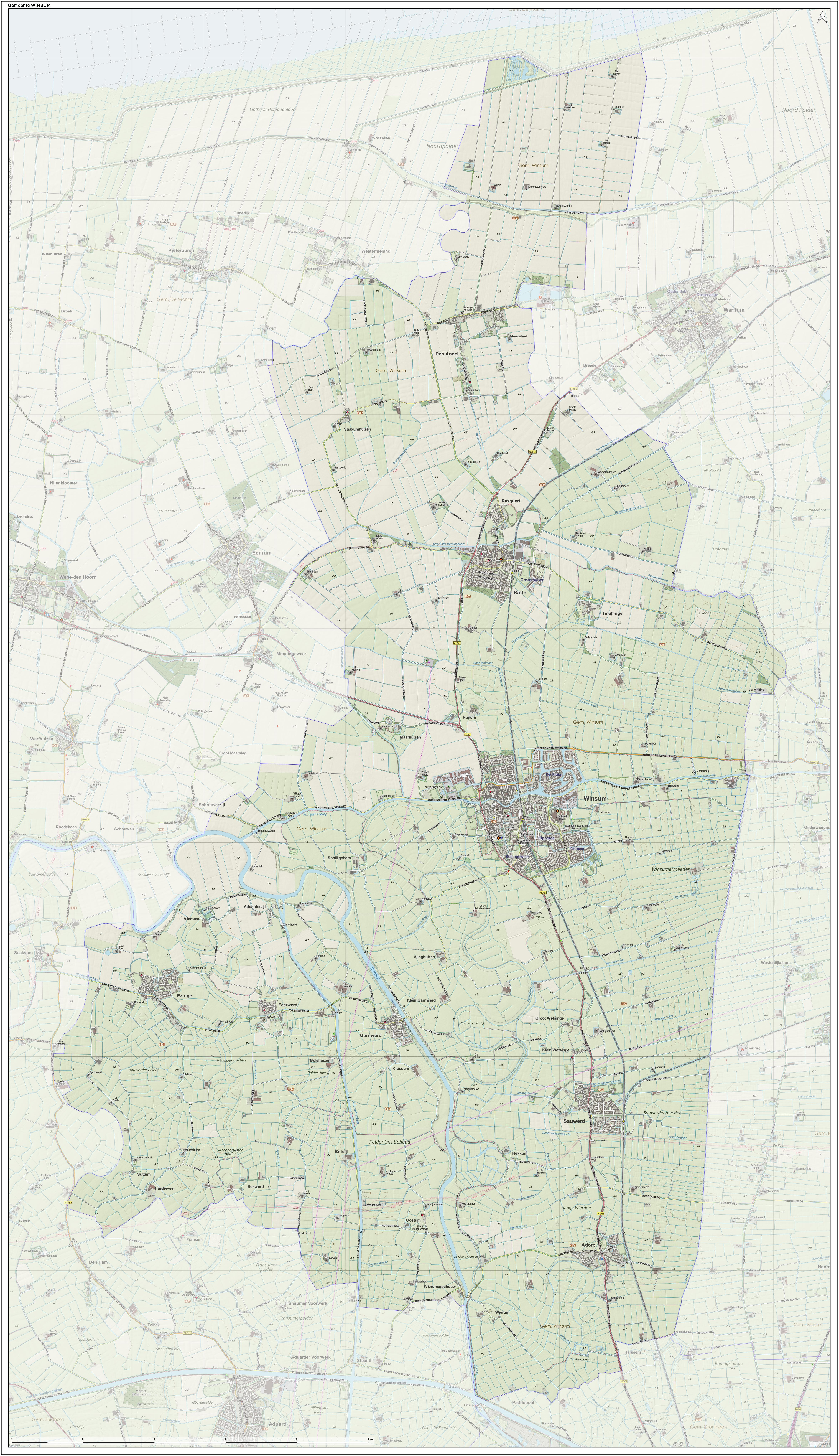 Topografische gemeentekaart. Resolutie: 400 pixels/km. Kaartbeeld samengesteld uit de open geodata van de Top10NL en Top25namen (Kadaster), Creative Commons-BY licentie. Gebouwvlakken uit open geodata BAG extract. Wegen uit de OpenStreetMap, OpenStreetMap community. Reliëfschaduw uit de Actuele Hoogtekaart AHN2. Samenstelling en kleurenschema: Jan-Willem van Aalst, met QGIS. Zie ook de Legenda.